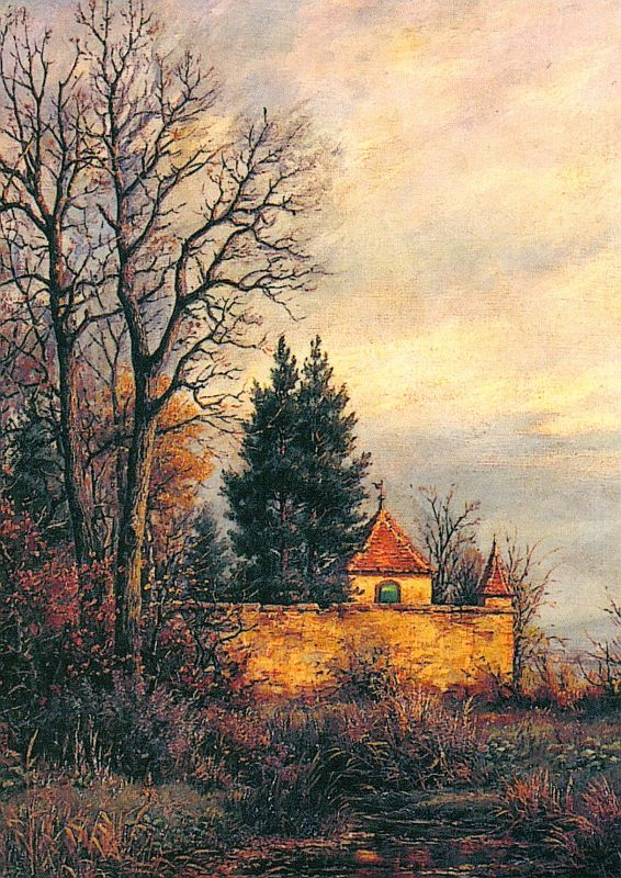 Wilhelm Gattinger: Marienhof (Saarlouis) (1922, Öl auf Leinwand)